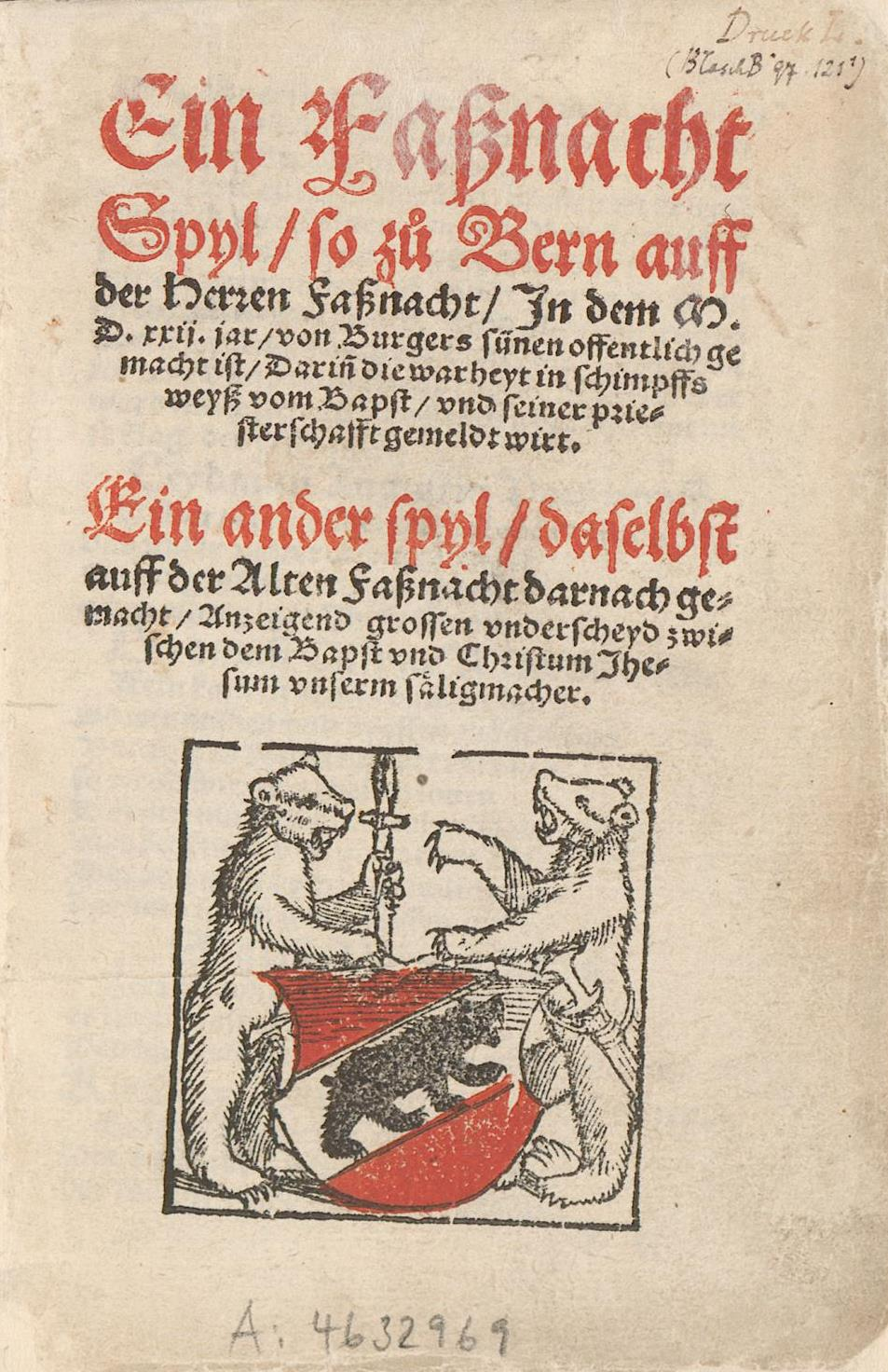 Niklaus Manuel, Ein Fassnacht-Spyl so zu Bern 1522 gemacht, Titelblatt [Babst und seiner priesterschafft]